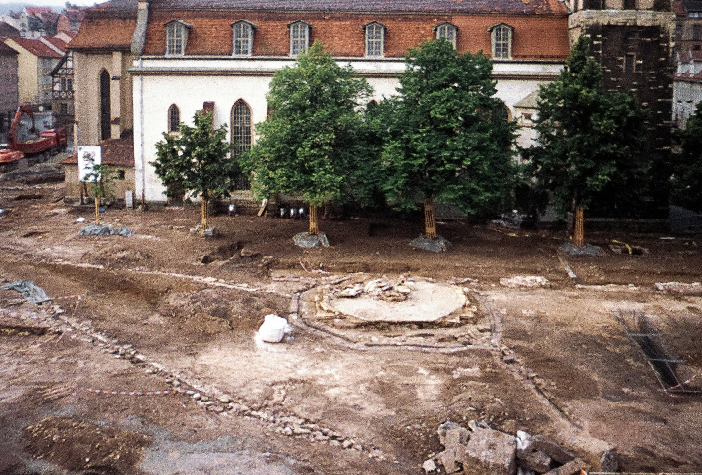 Der Marktplatz im Sommer 1999, freigelegte Strukturen der spätmittelalterlichen Entwässerungsrinnen sowie Fundamente der einstigen Marktbrunnen und weitere Befunde.